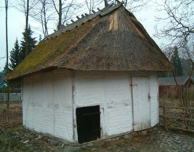 Huggehus hørende til husmandssted fra Dannemare på Sydvest-Lolland, nu på Frilandsmuseet i Sorgenfri (nr. 72). Huggehuset er fra 1800-tallet og indeholder også arbejdsbord, snittebænk og værktøj, herunder rammesav. Fotograferet af Hans Christophersen i 2006.